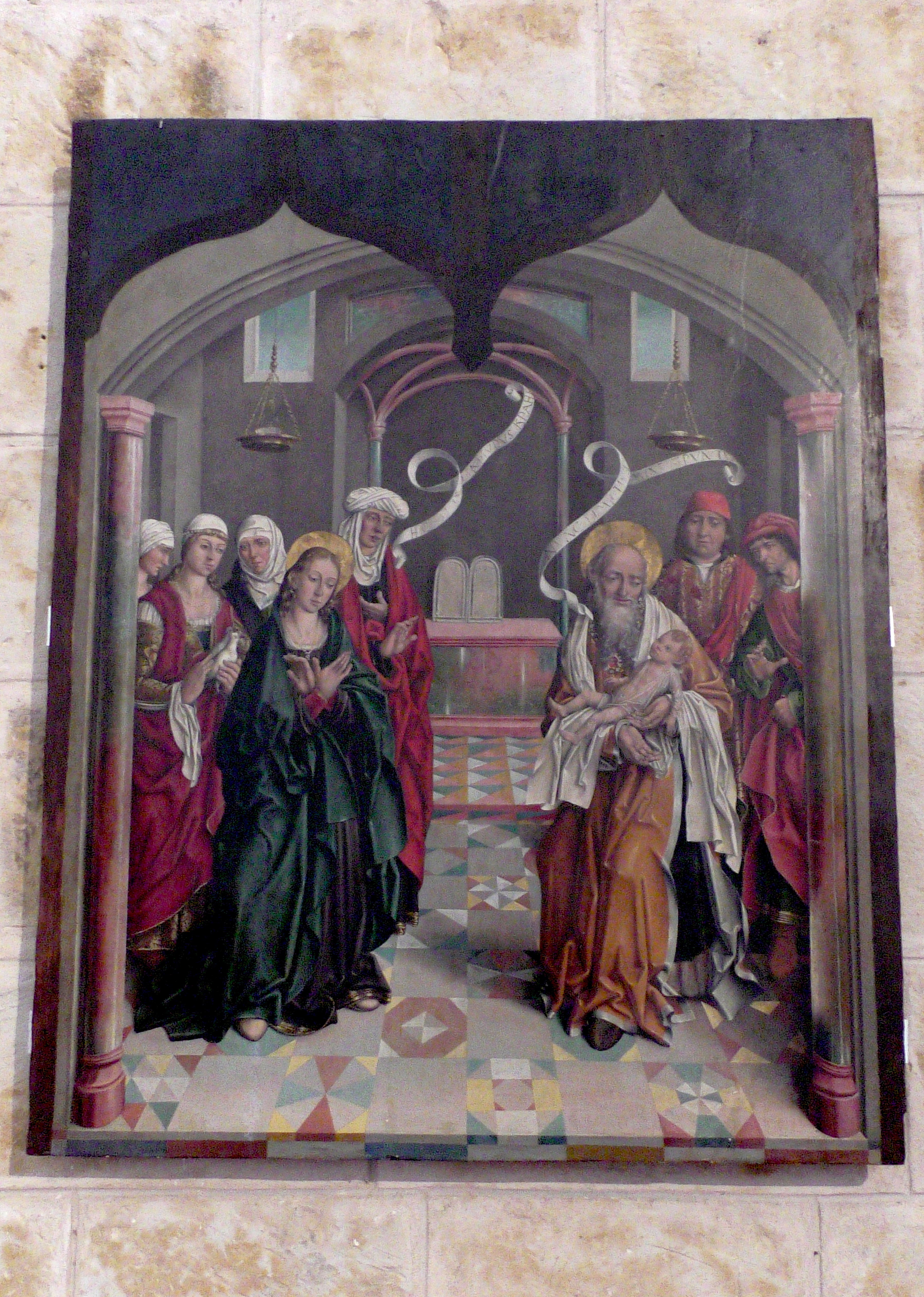 Iglesia de la Asunción